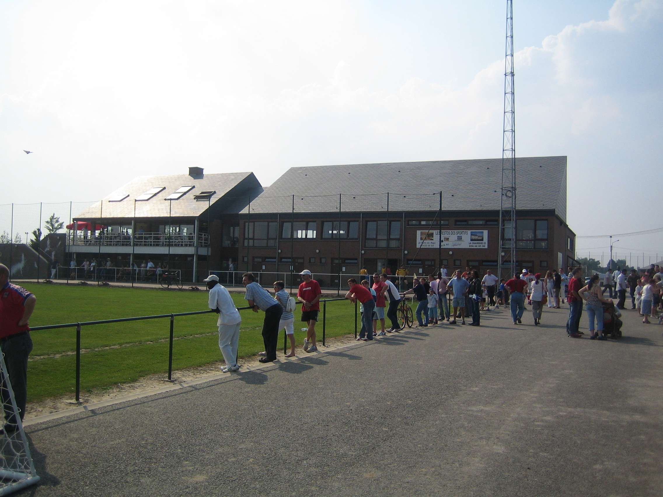 Parents, et supporters des équipes de jeunes du Royal Excelsior Mouscron